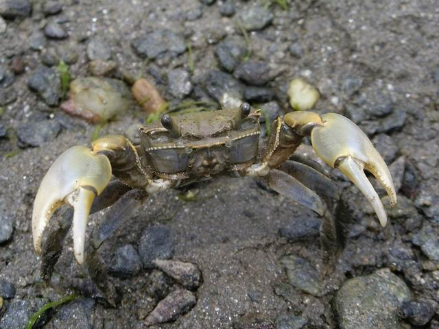 Helice tridens (アシハラガニ), Kohnoura, Nagasaki(長崎市神浦)